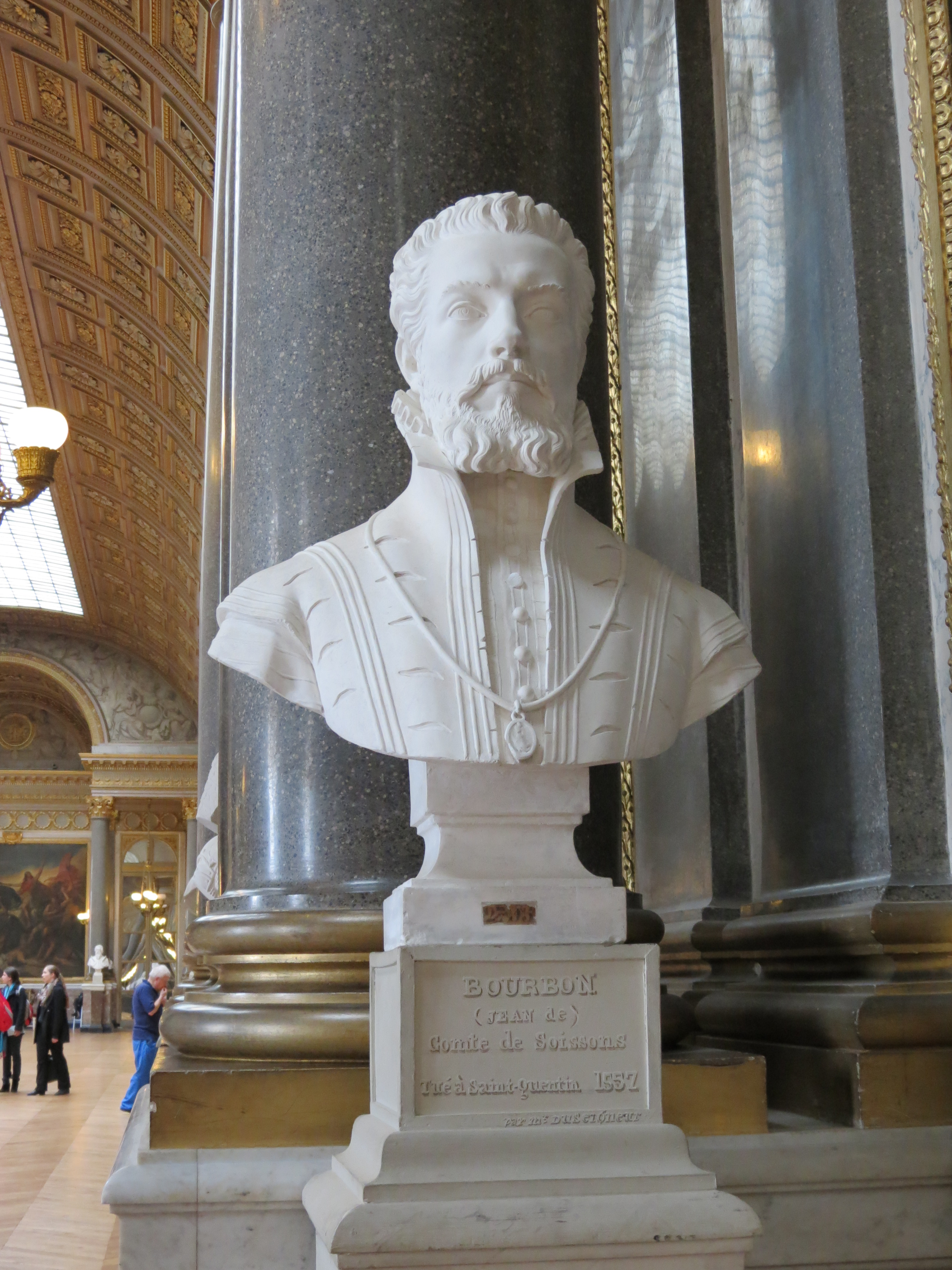 Buste de Jean de Bourbon, comte de Soissons, sculpté par Duseigneur.